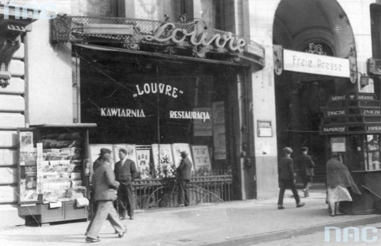 Łódź Piotrkowska 86 około 1930 r (Narodowe Archiwum Cyfrowe, sygn. 1-G-7080)